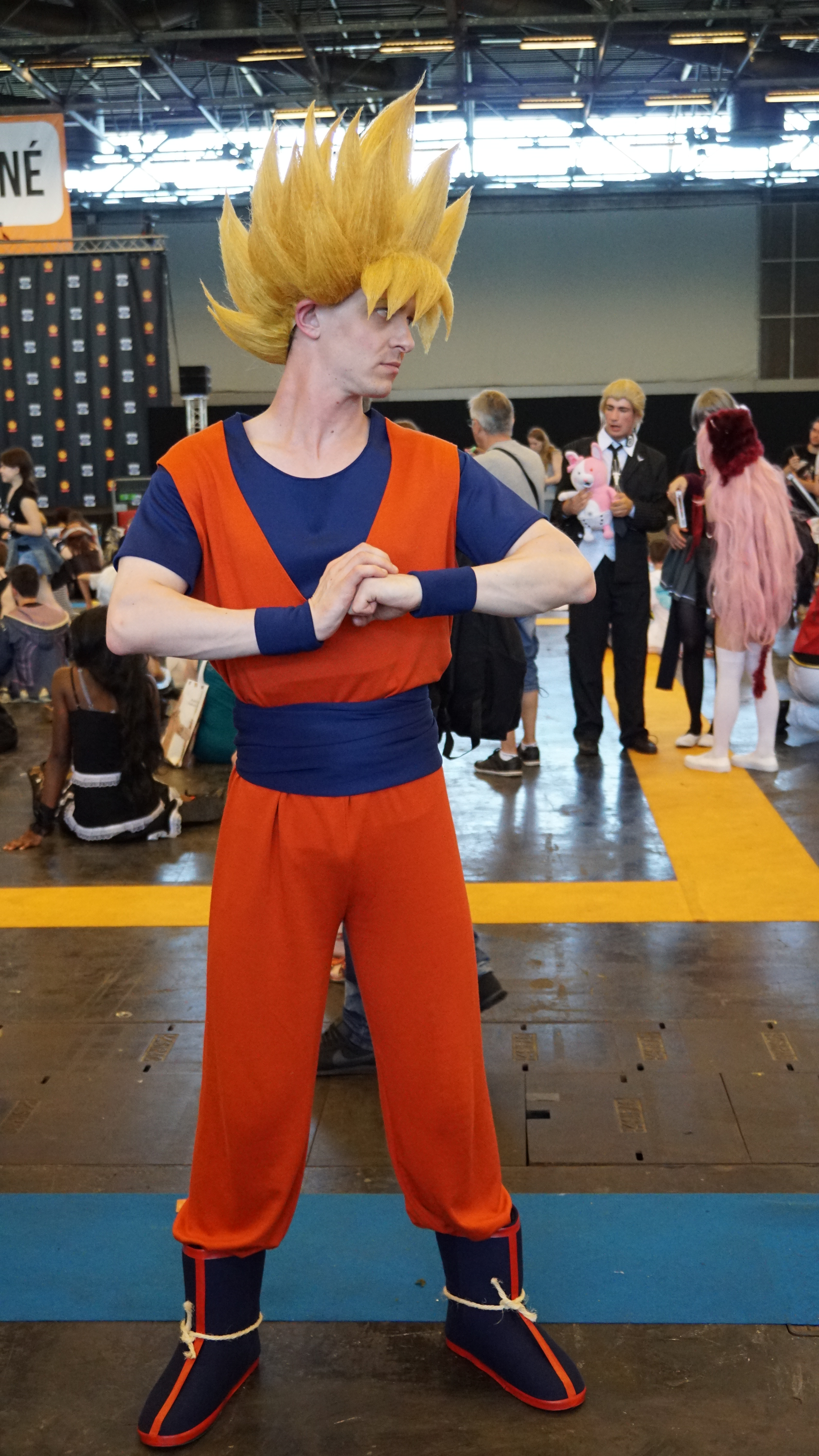 Japan Expo est un salon evenementiel professionnel francais sur la culture populaire japonaise, qui se deroule au parc des expositions de Paris-Nord Villepinte tous les ans en debut du mois de juillet, voire en fin du mois de juin sur une periode de quatre jours. Il s'agit d'une manifestation culturelle consacree aux manga, aux jeux video, aux anime, mais aussi aux arts martiaux, a la mode, a la musique (J-pop, Jrock, traditionnel), au cinema, aux traditions et cultures, aux jeunes artistes et createurs, au sport mecanique.